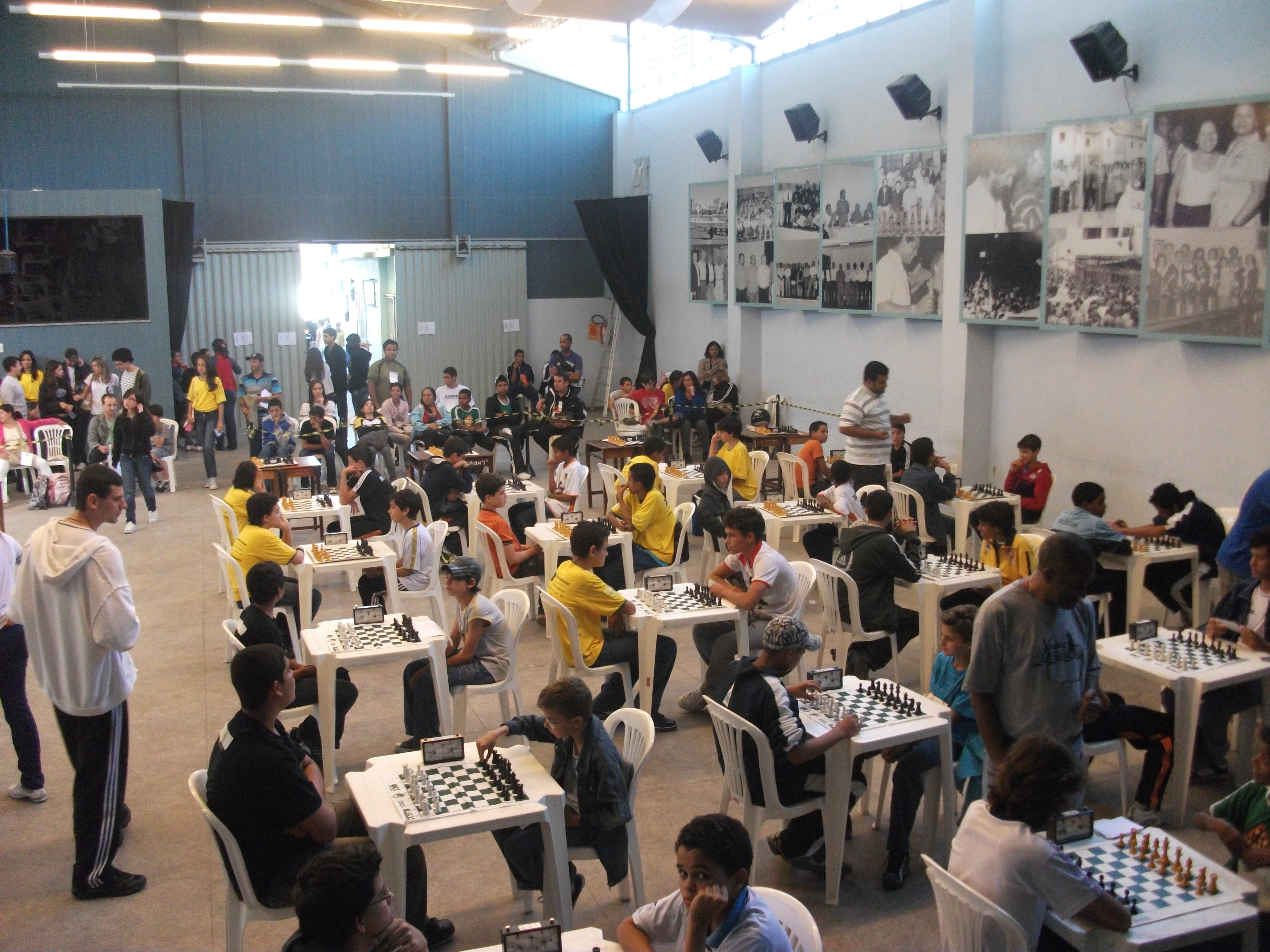 Competição de Xadrez do JEMG, Jogos Escolares de Minas Gerais, em Monlevade.